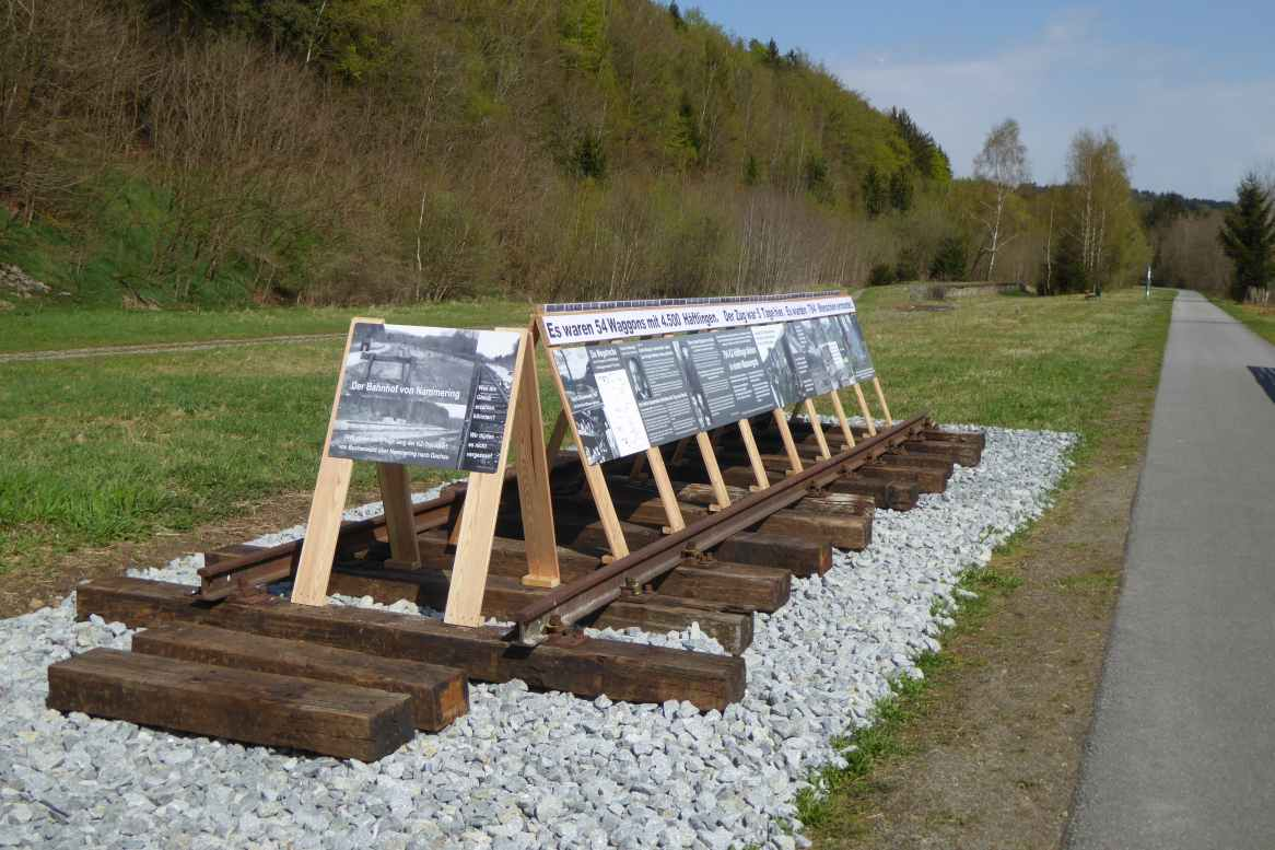 Gleis der Erinnerung mit einer Dauerausstellung, die das Geschehen vom 5tägigen Aufenthalt des KZ-Transportzuges mit 54 Waggons und 794 Ermordeten zeigt, aber auch die Hilfsbereitschaft der Bevölkerung, die der Pfarrer von Aicha Johann Bergmann zu einer Lebensmittelspende aufgerufen hat.